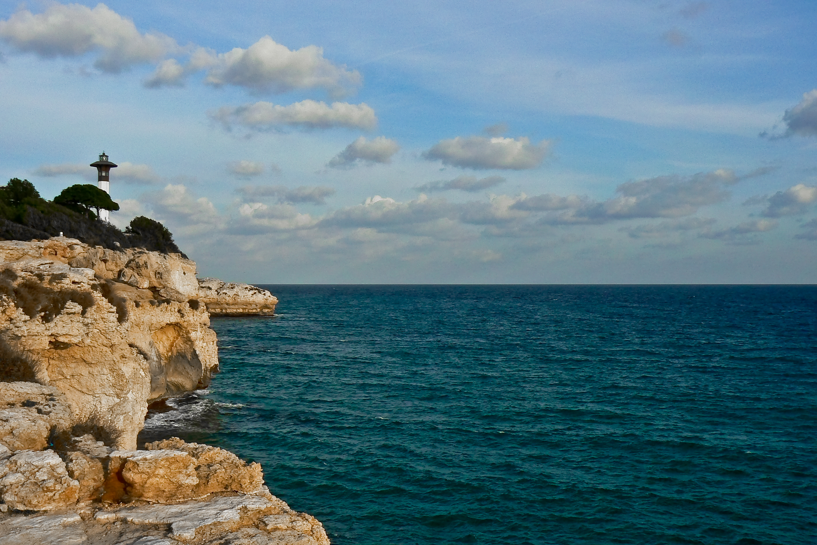 Roquer de Torredembarra on es veu el far